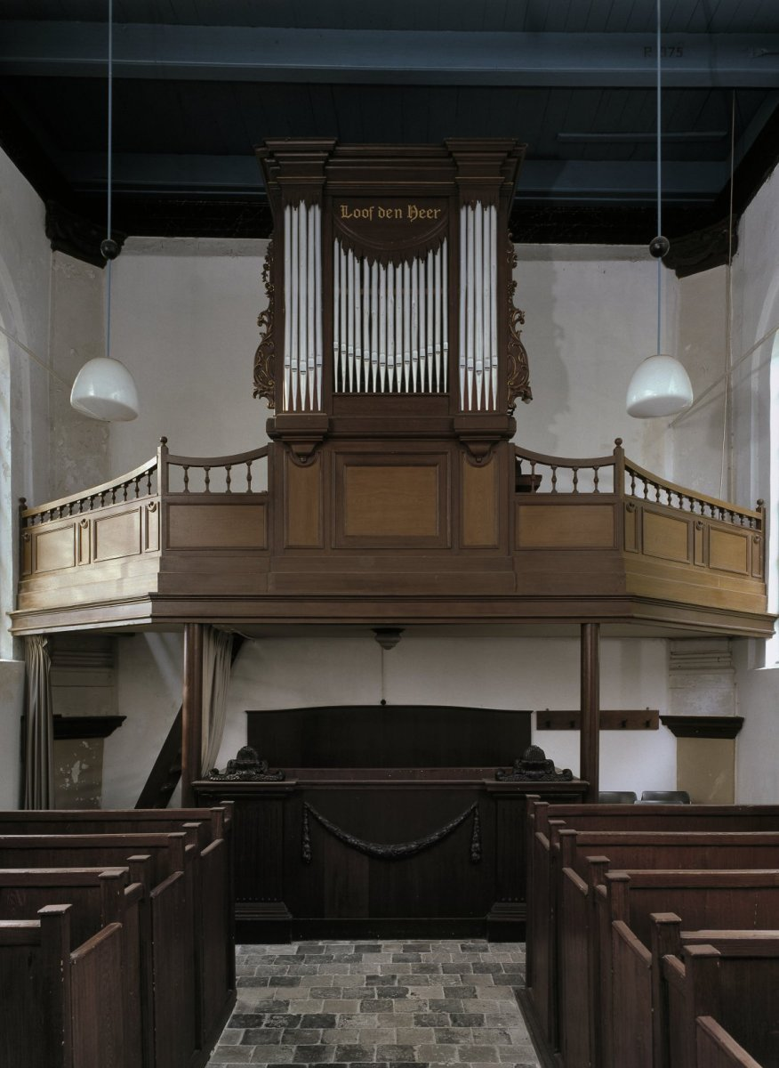 Hervormde kerk: Interieur, aanzicht orgel, orgelnummer 1382 (opmerking: Gefotografeerd voor Het Historische Orgel in Nederland 1858-1865)